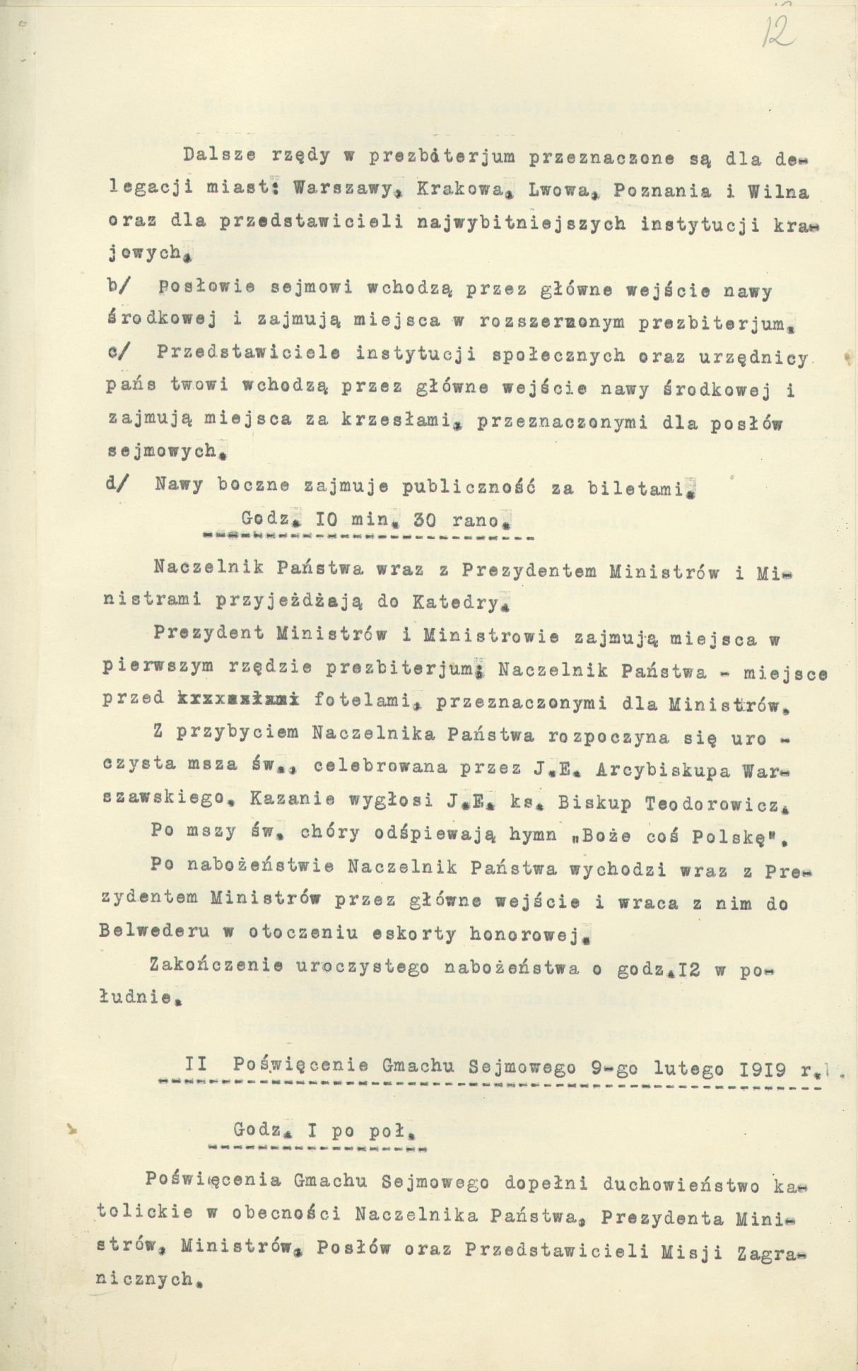 Porządek uroczystości otwarcia Sejmu Ustawodawczego